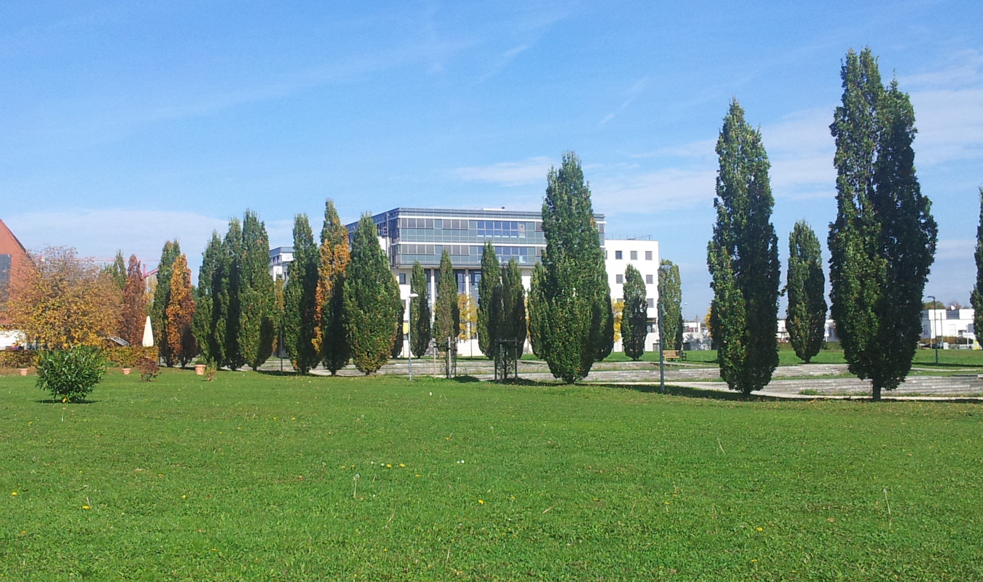 Ostfildern, Firmengebäude der Deutschen Automobil Treuhand, von der Landschaftstreppe im Süden gesehen.